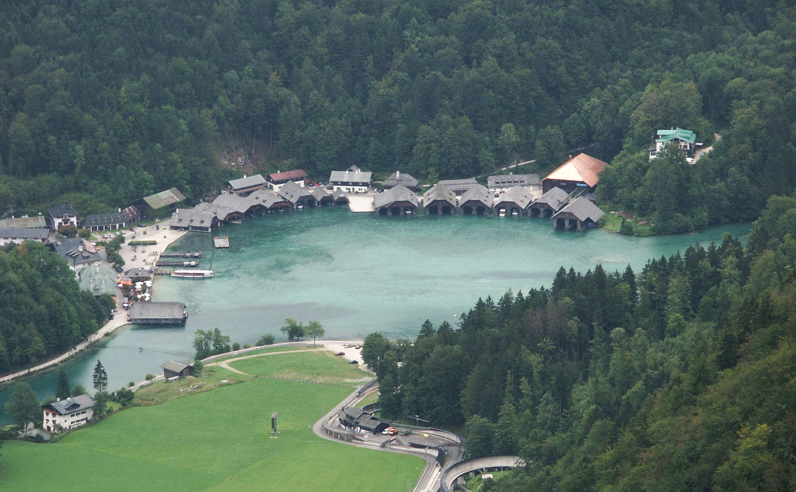 Königssee, Germany